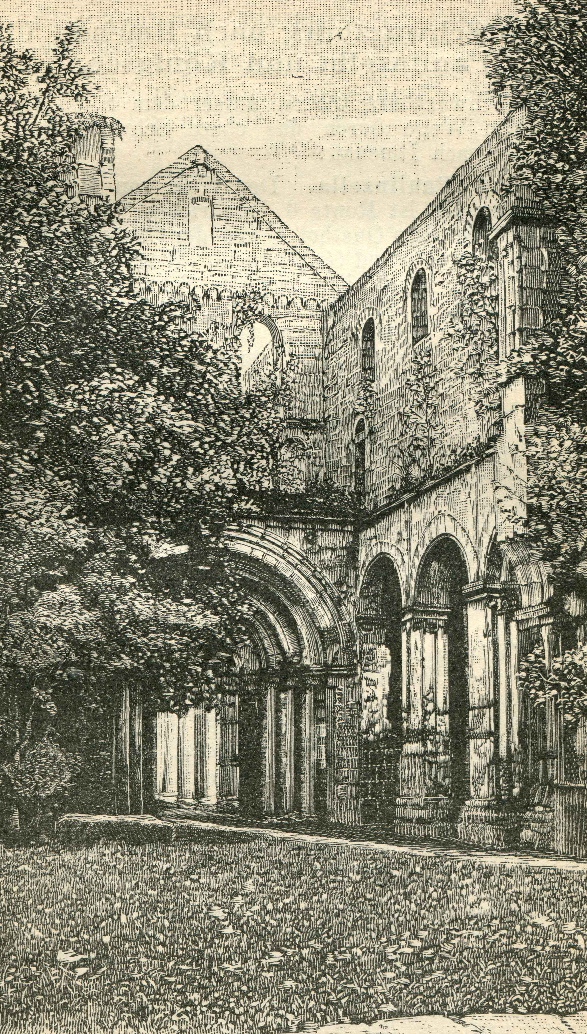 Klosterruine Paulinzella, Thüringen